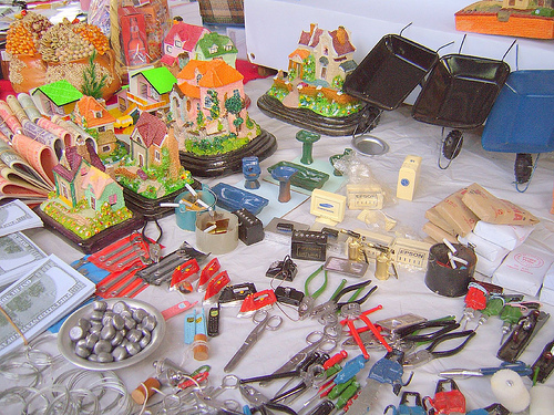 imagen tomada en un puesto de venta de la Feria de las Alasitas en La Paz, Bolivia.